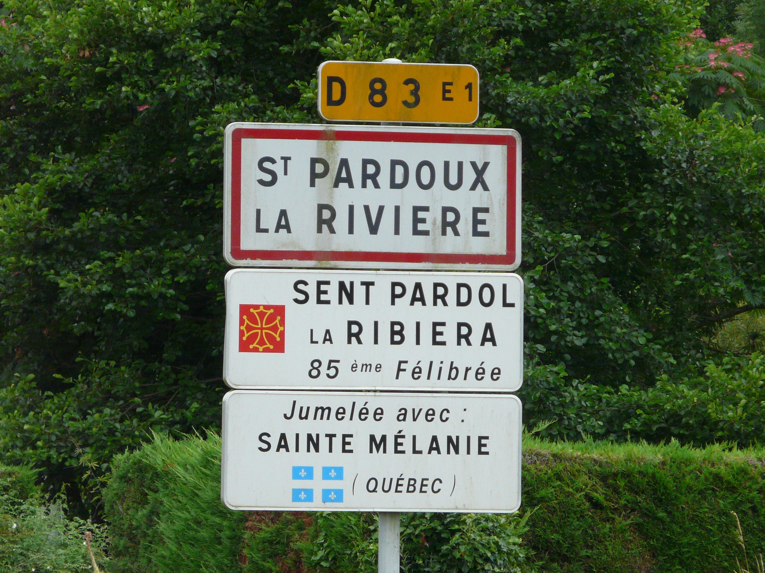 Panneau d'entrée à Saint-Pardoux-la-Rivière avec le nom occitan et la ville jumelée, Dordogne, France.